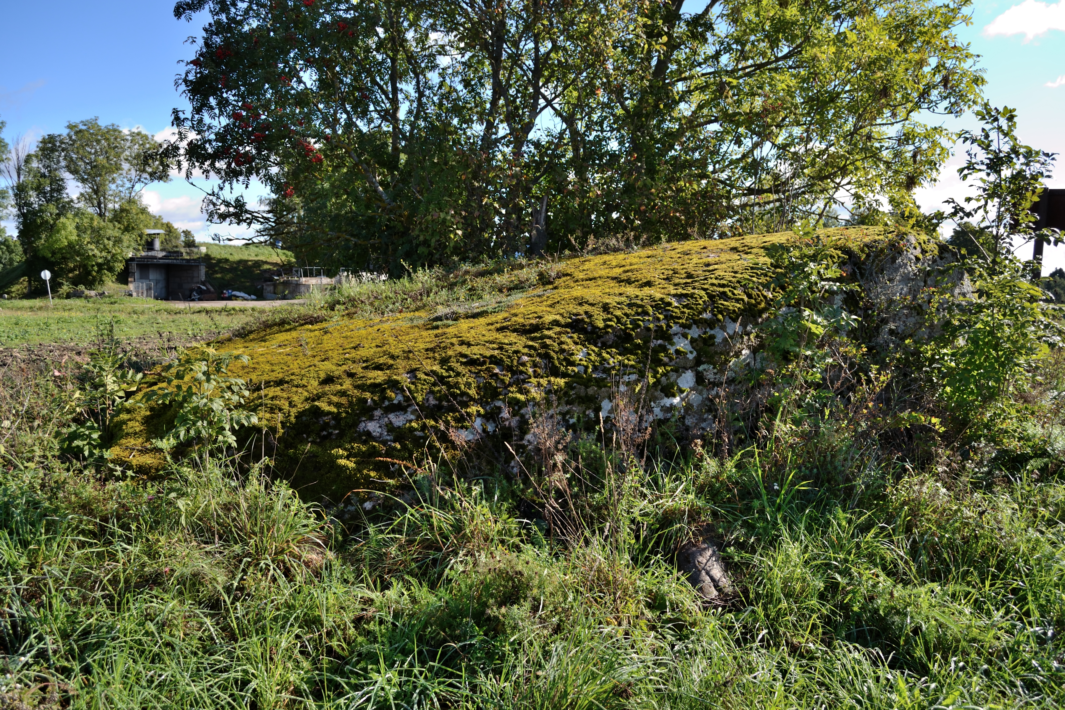 Kultusekivi, Saue vald, Aila küla Vanaõue